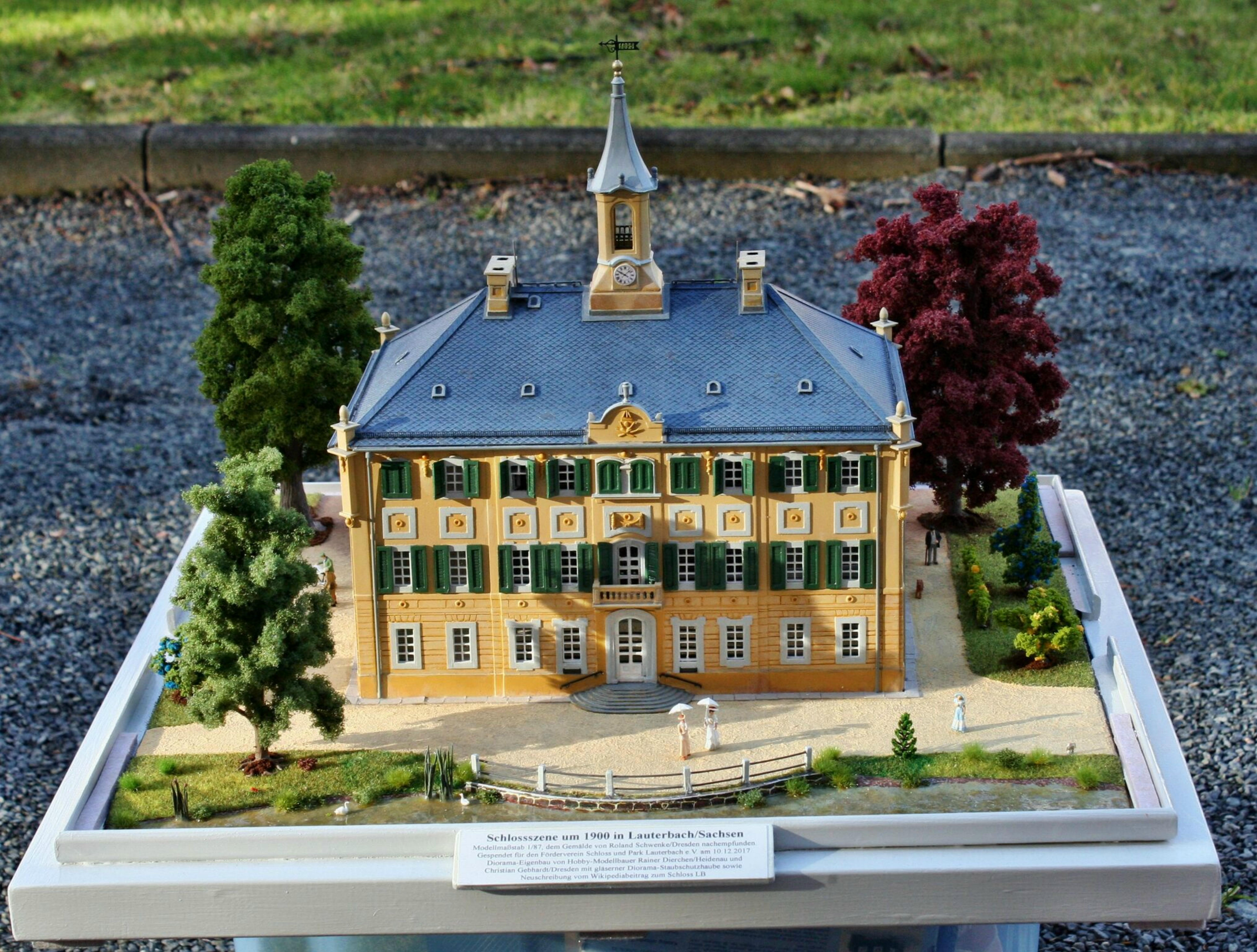 Lauterbach-Schlossmodell im Maßstab 1:87, Modellansicht vom Hobby-Modellbauer Rainer Dierchen.